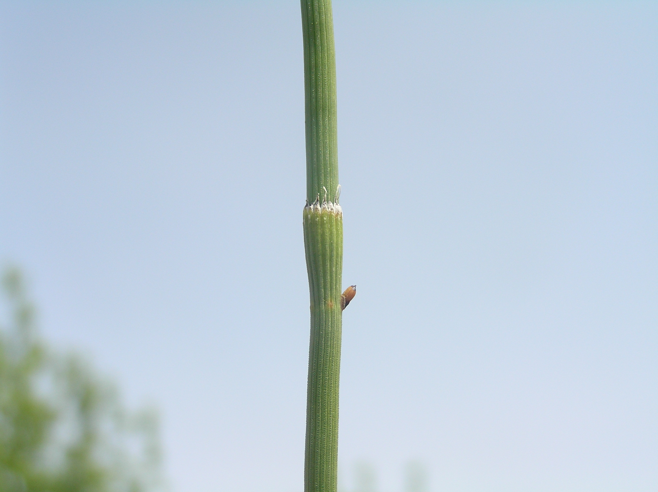 Equisetum ramosissimum, Brno - Židenice, Czech Republic